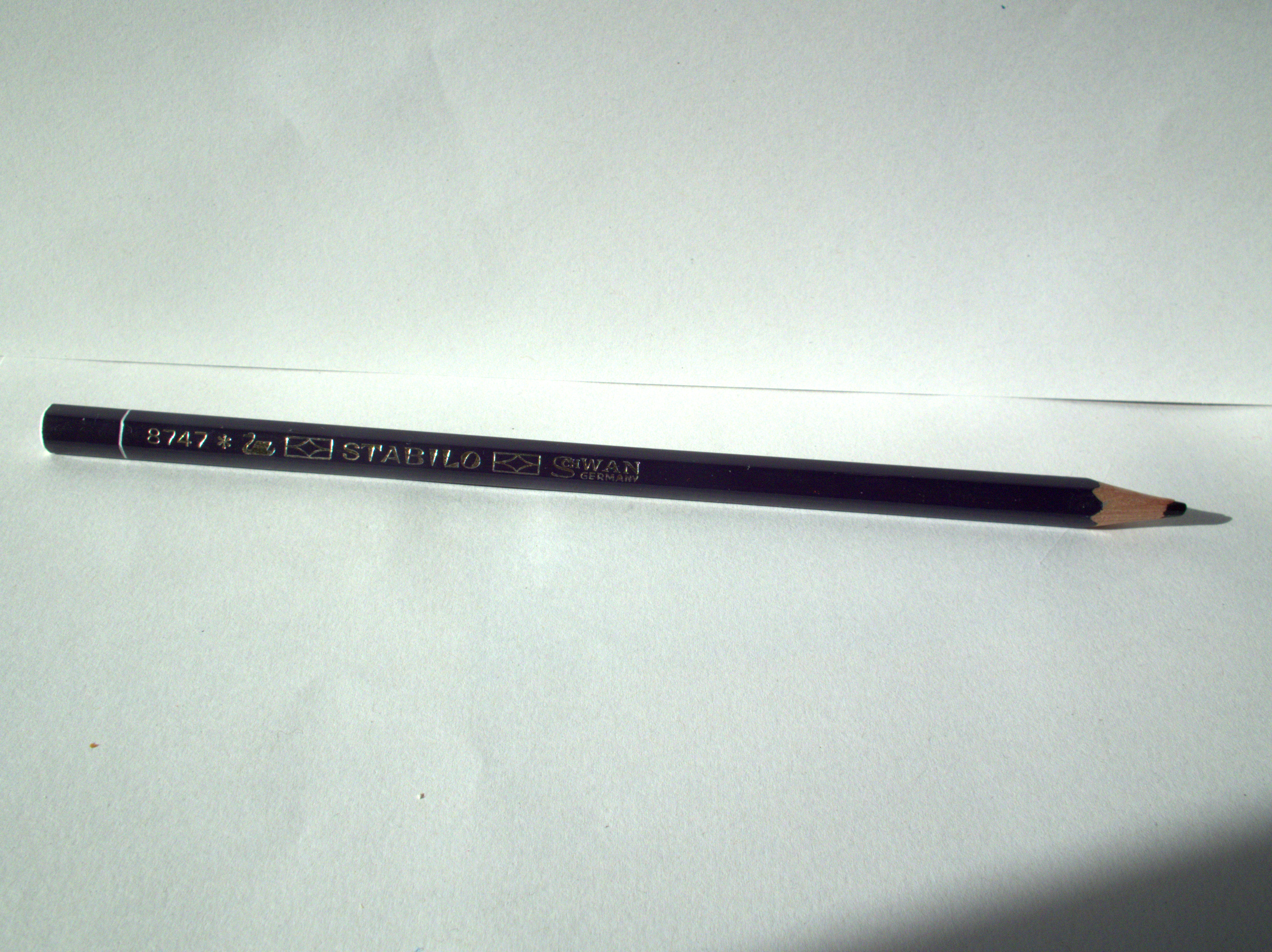 Bleistift der Fa. Schwan-Stabilo Nürnberg